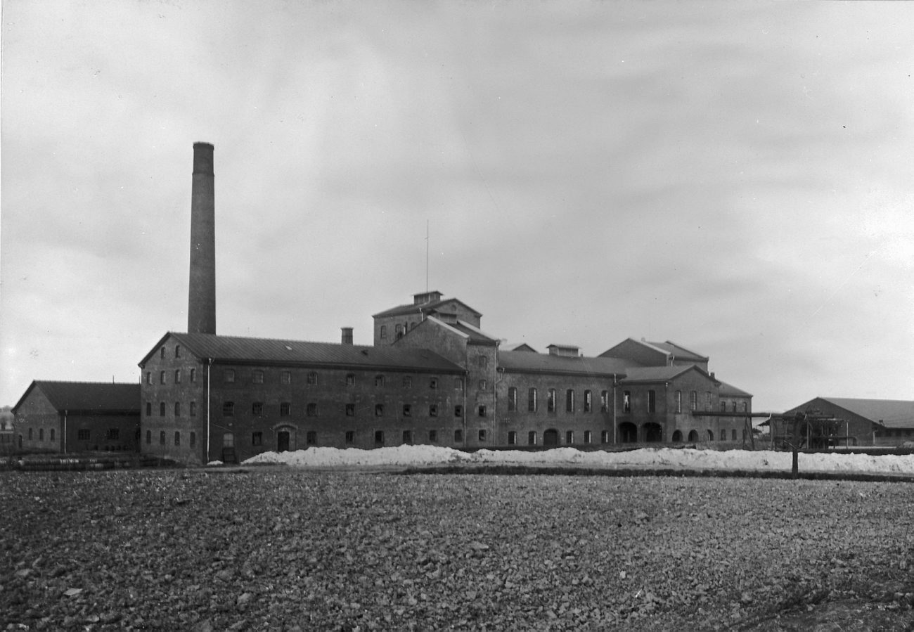 B17482. Svedala Sockerfabrik. Fotografiet är skänkt till Tekniska museet från Svenska Turistföreningen.